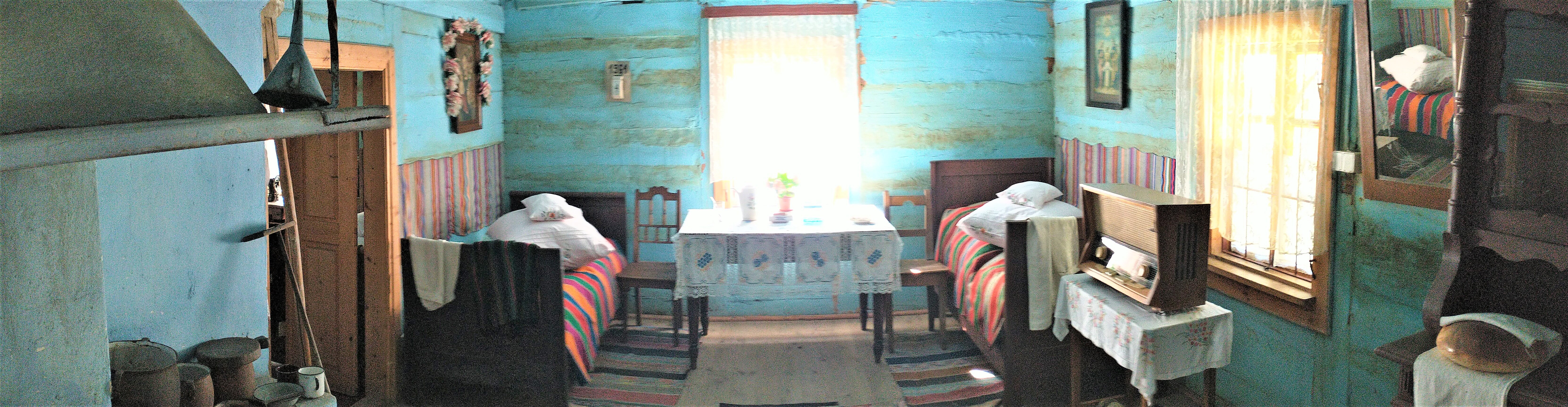 Muzeum Wsi Radomskiej w Radomiu - skansen.